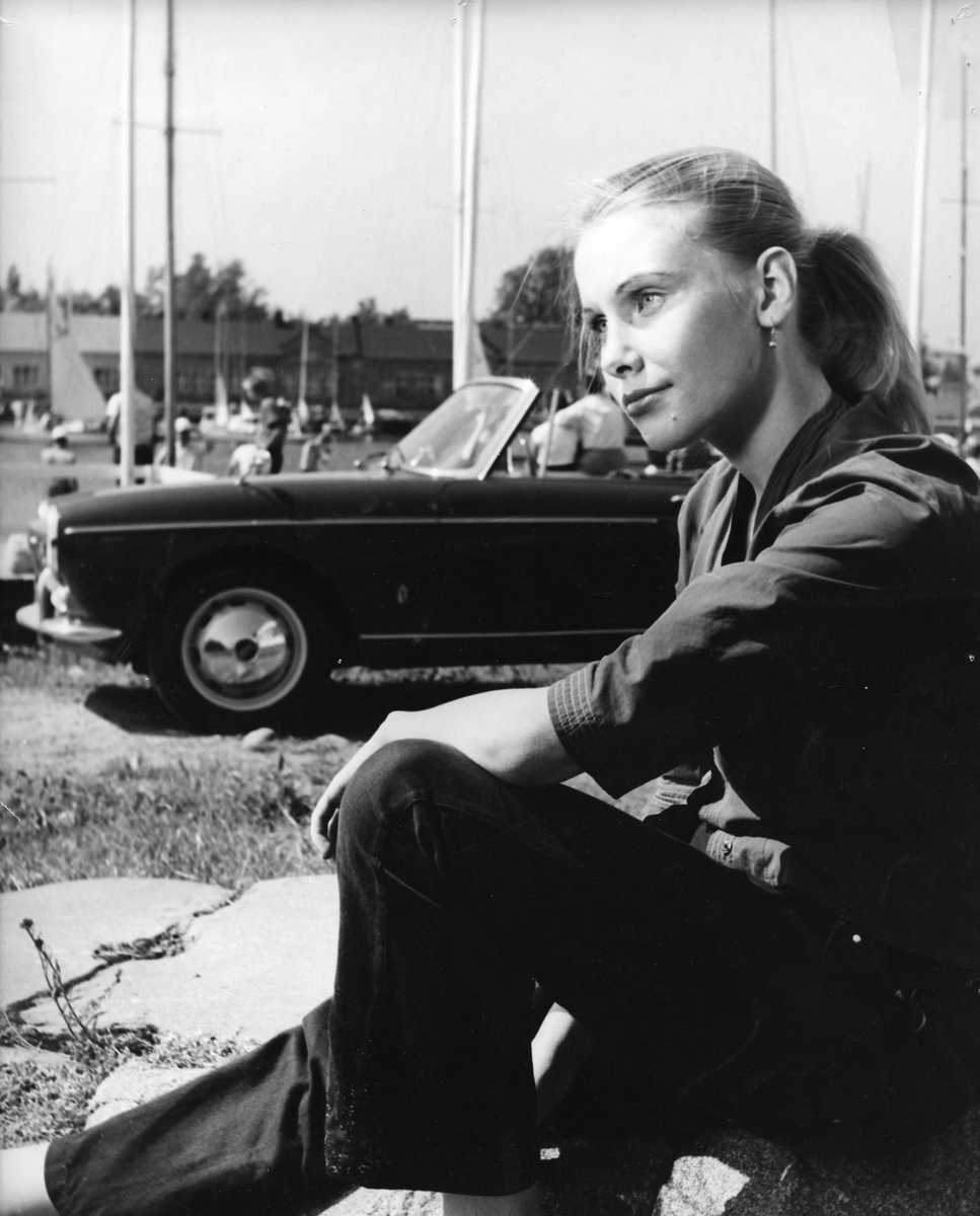 Näyttelijä Ritva Vepsä (1941–2016) elokuvan Autotytöt kuvauksissa.